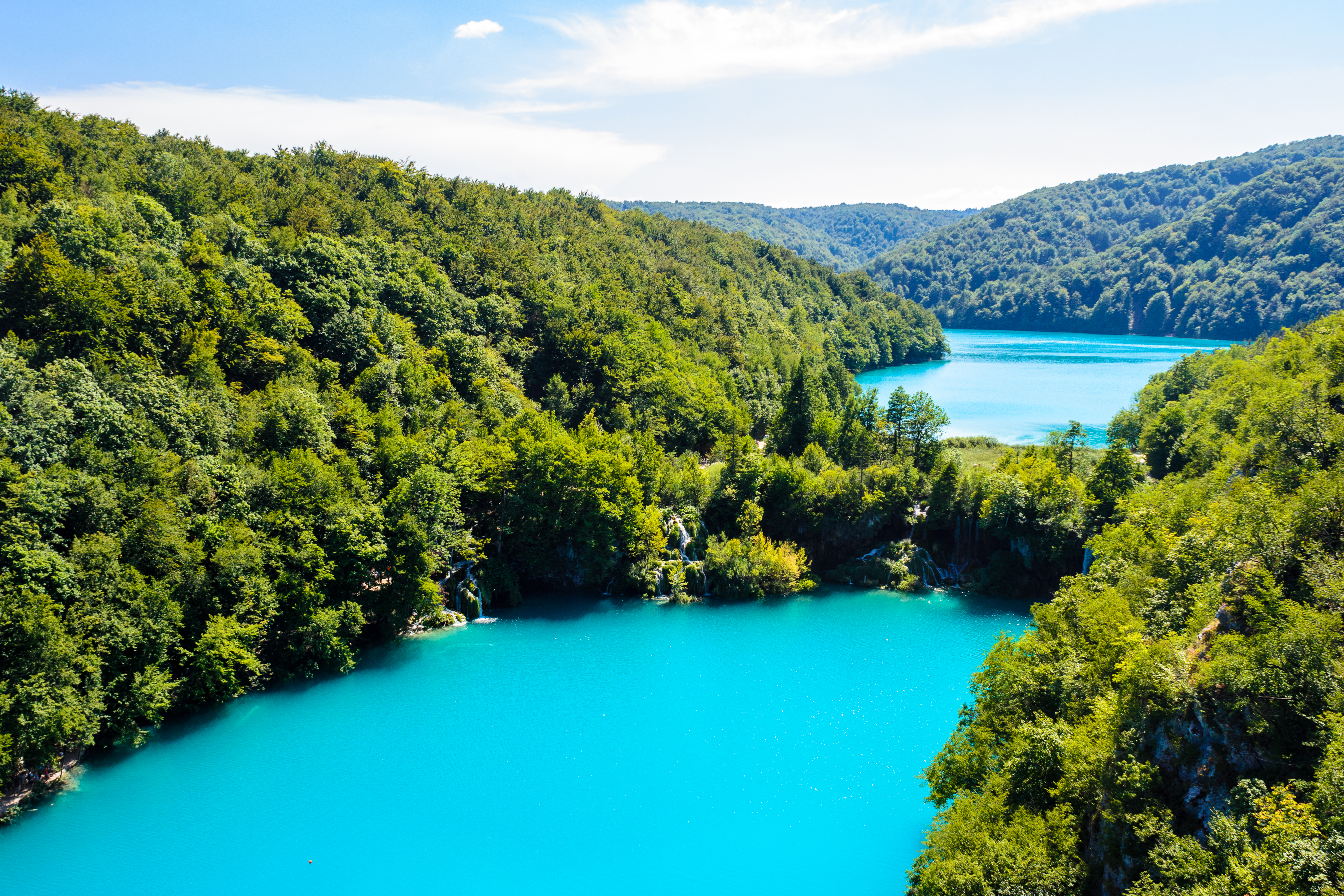 Plitvice Lakes